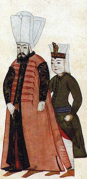 Janissaries